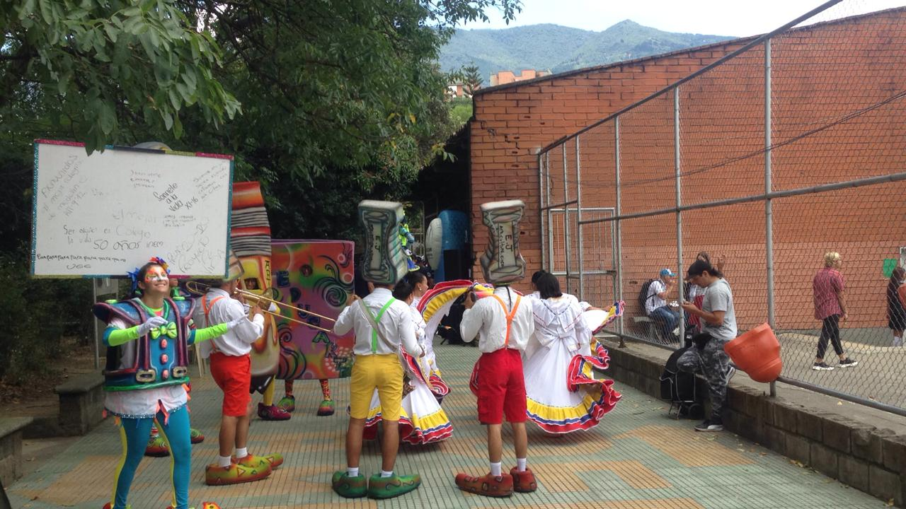 Zona cerca a canchas